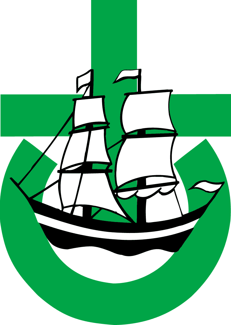 Logo Ev. - luth. Missionswerk in Niedersachsen (ELM)